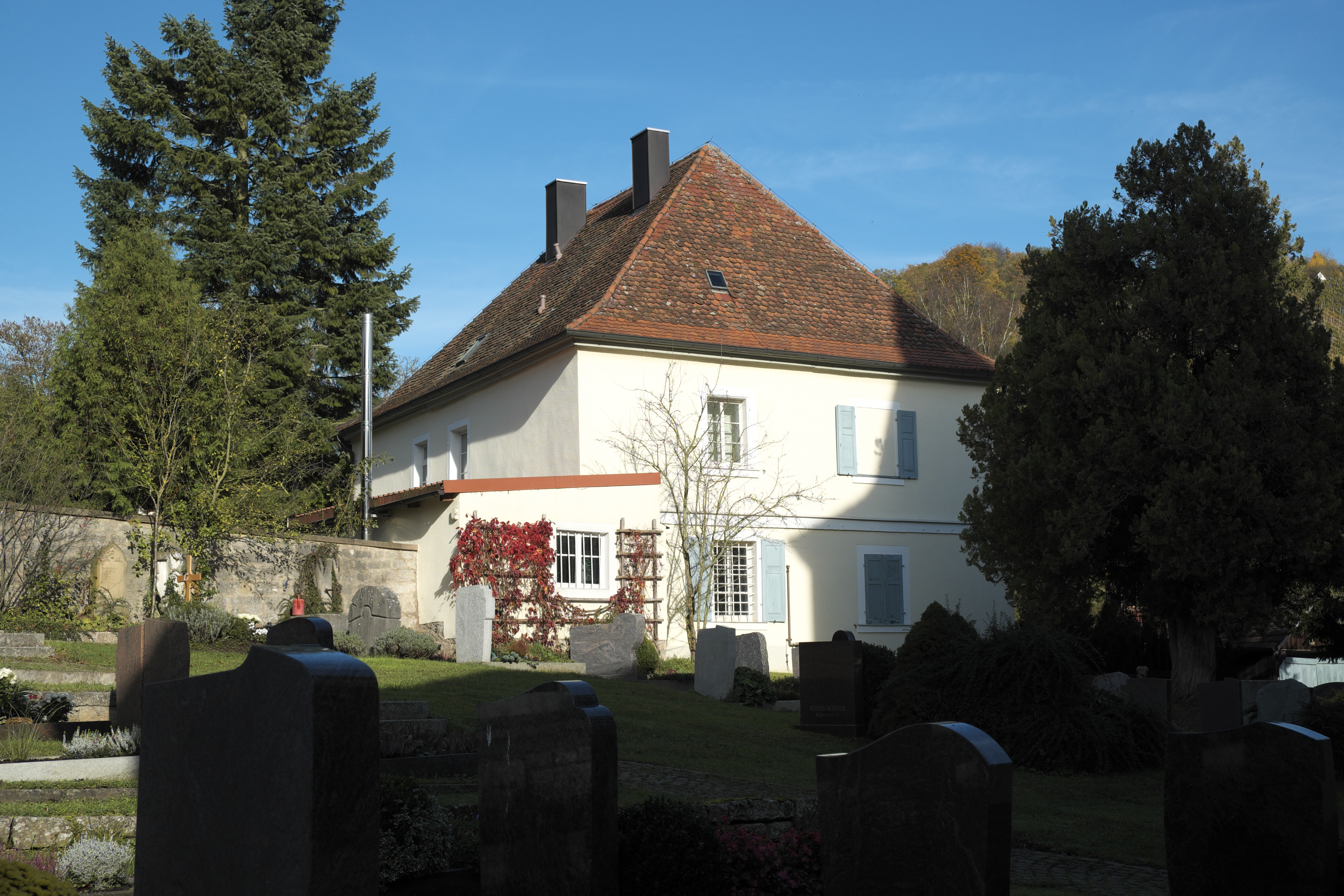 Pfarrhaus in Tauberzell, einem Ortsteil von Adelshofen in Mittelfranken (Bayern), von 1732